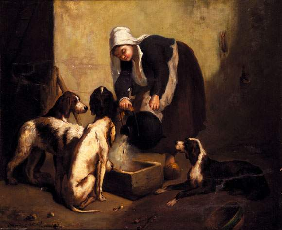 La soupe des chiens de chasse par Evariste-Vital Luminais (1822-1896). Huile sur toile signée en bas à gauche, 63 x 52 cm.